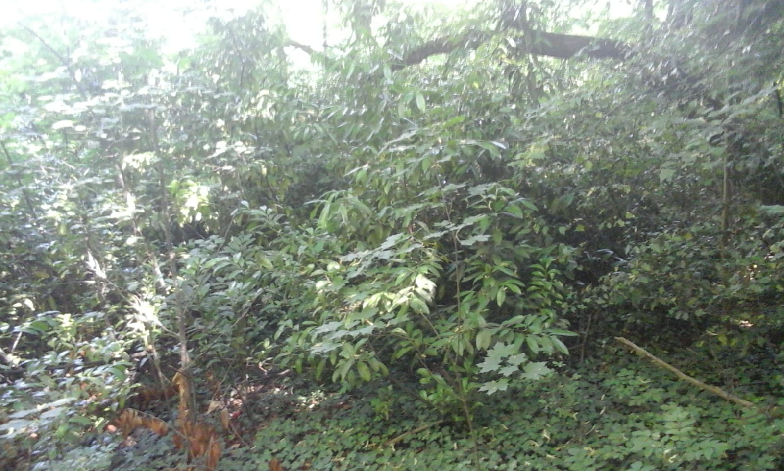 Sous-boit envahit par des lauriers-palme (Prunus laurocerasus) en France.